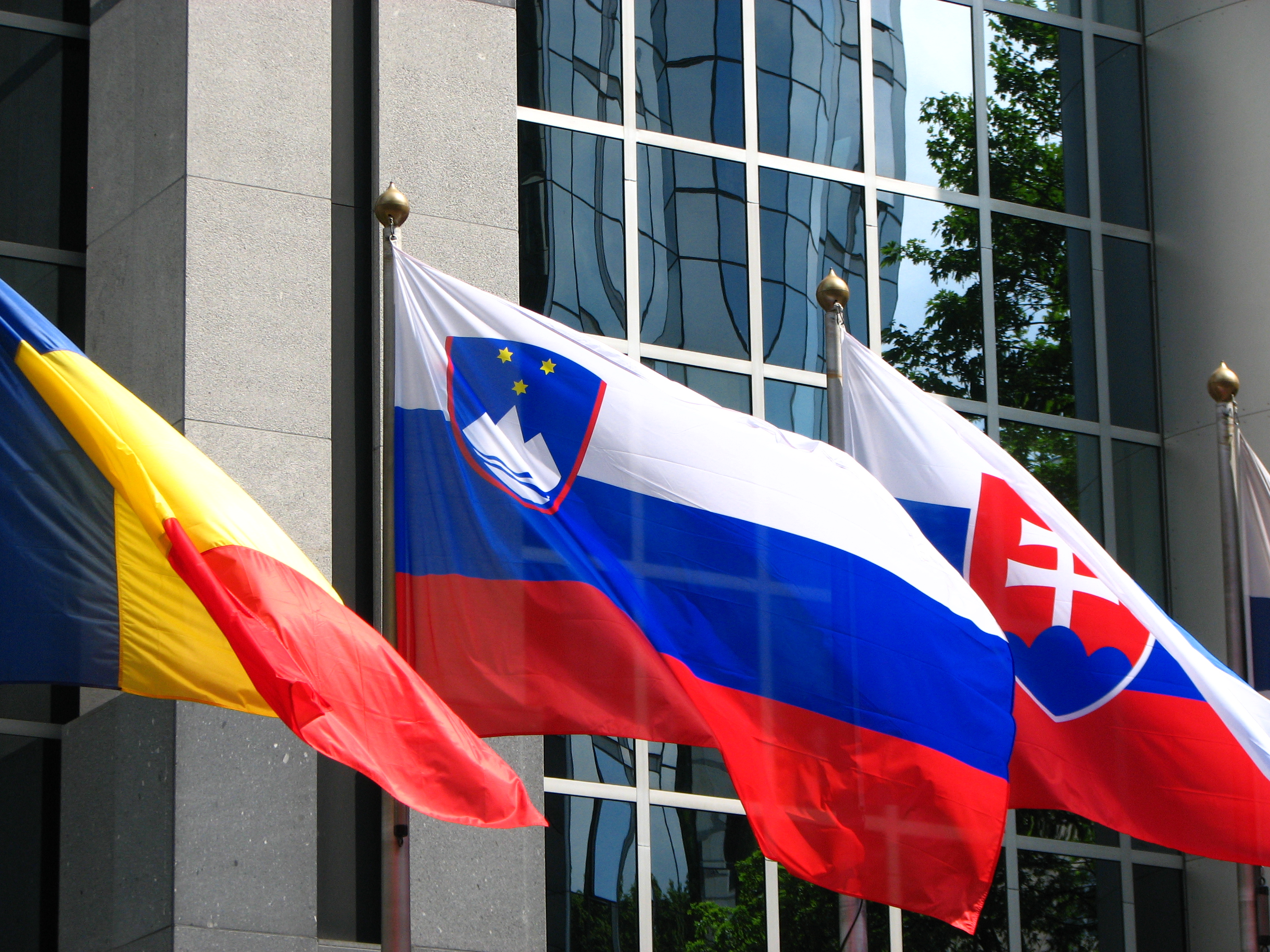 European Flags